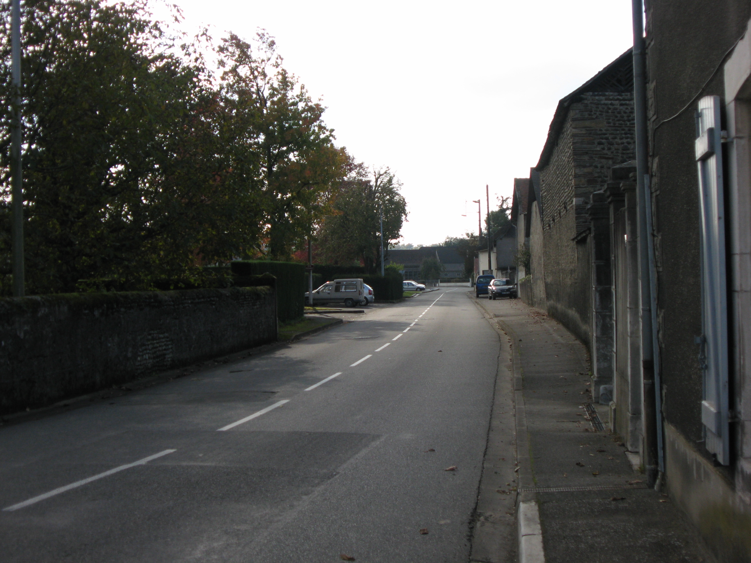 Rue principale de Noguères (Pyrénées-Atlantiques) Pyrénées).